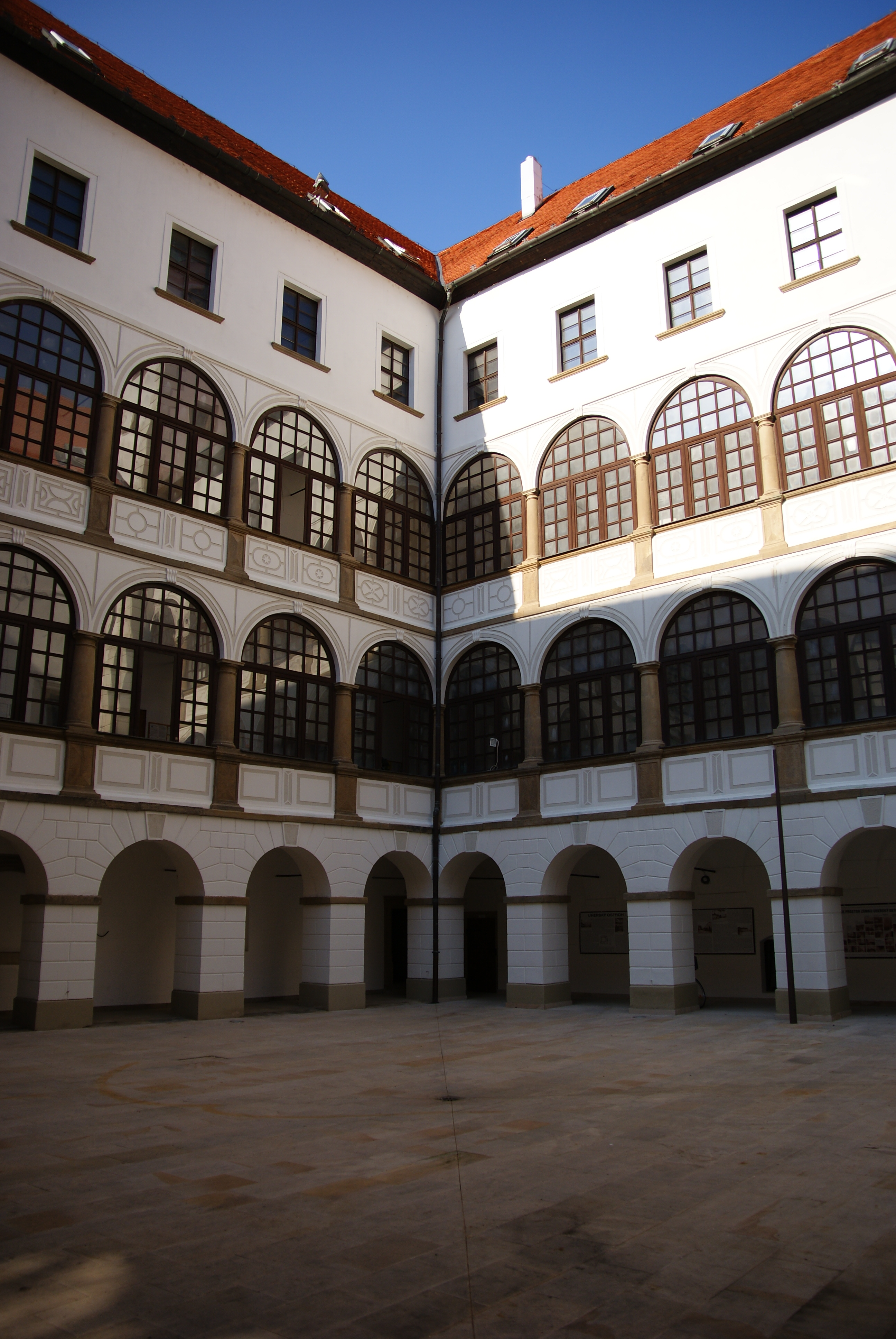 Zámek s přízámčím Uherský Ostroh, Zámecká 24, Uherský Ostroh